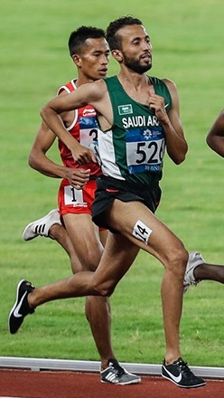 حسین کیهانی در رقابت‌های دو ومیدانی بازی‌های آسیایی ۲۰۱۸